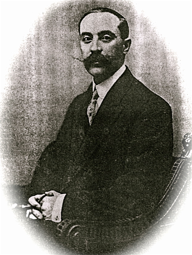 Bernardino Landete Aragó, pionero de la estomatología española.